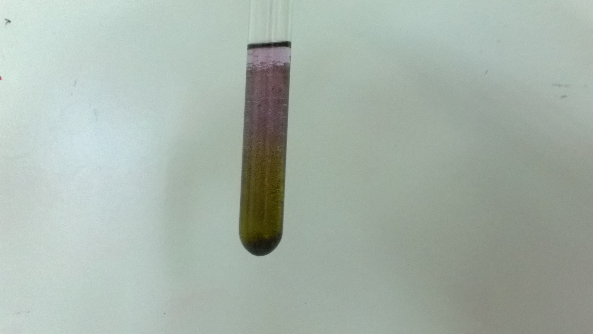 С марганцовой кислотой